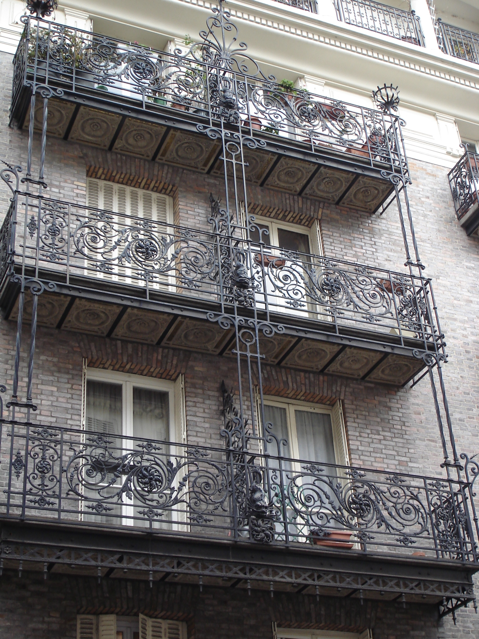 Rue des Bernardins, N° 17; Hispano-morisq style (detail)